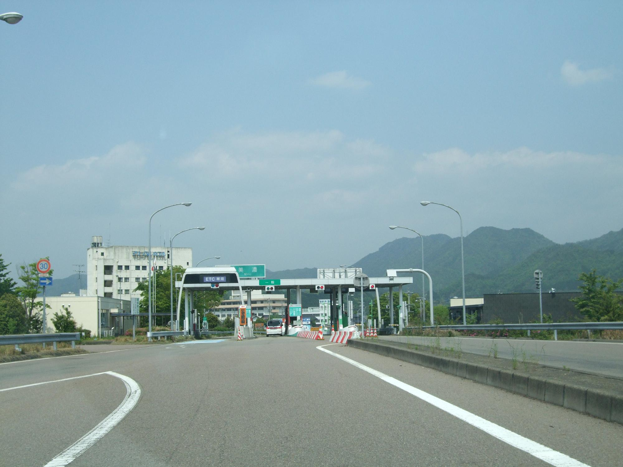 東海北陸自動車道 美濃インターチェンジ 料金所出口 2008.4.27 投稿者が撮影